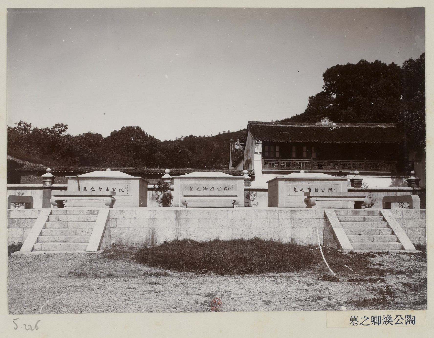 陶成章、杨哲商和沈由智墓，摘自《西湖风景》，由杭州二我轩照相馆摄于1911年。